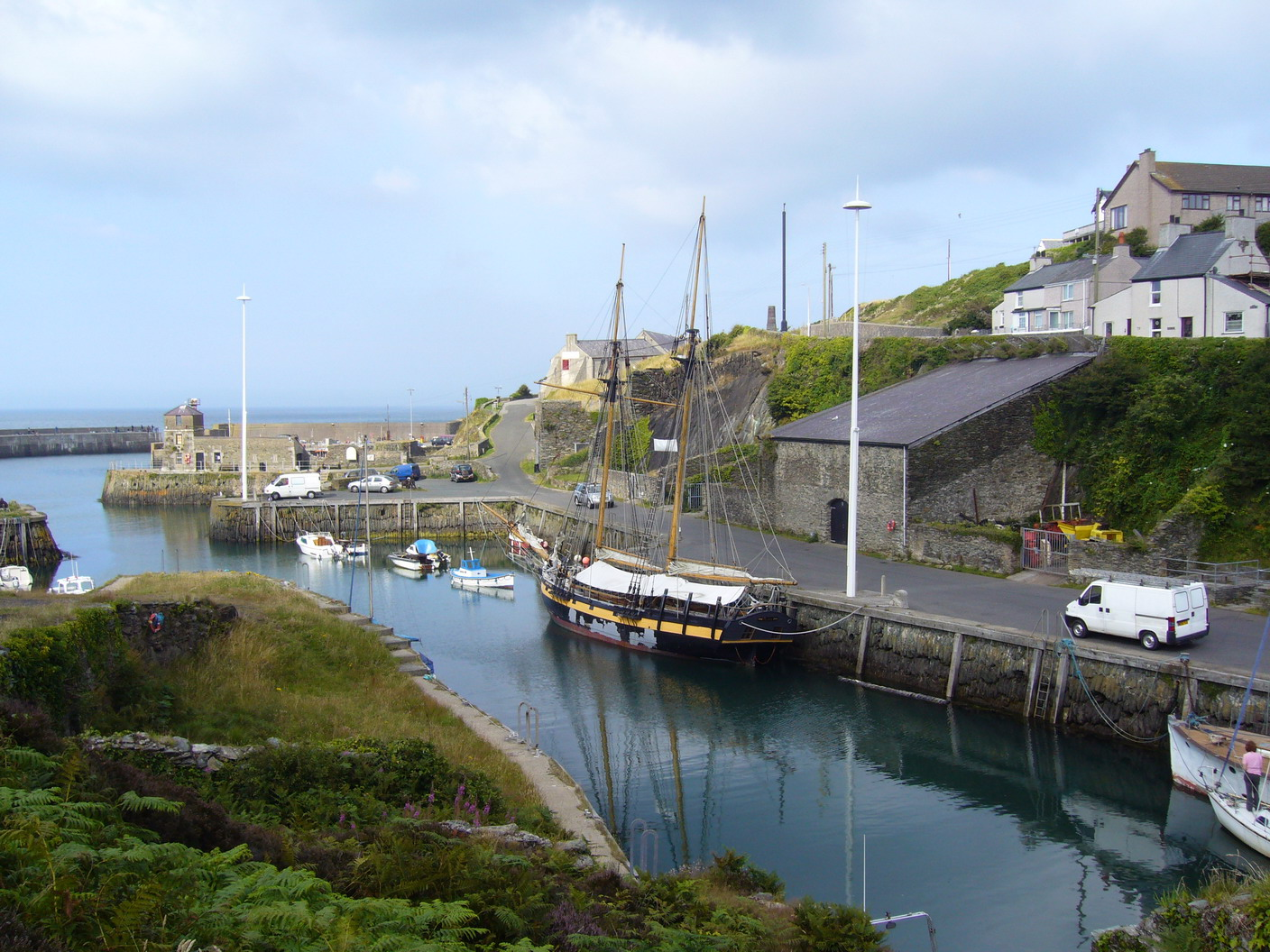 Amlwch Port